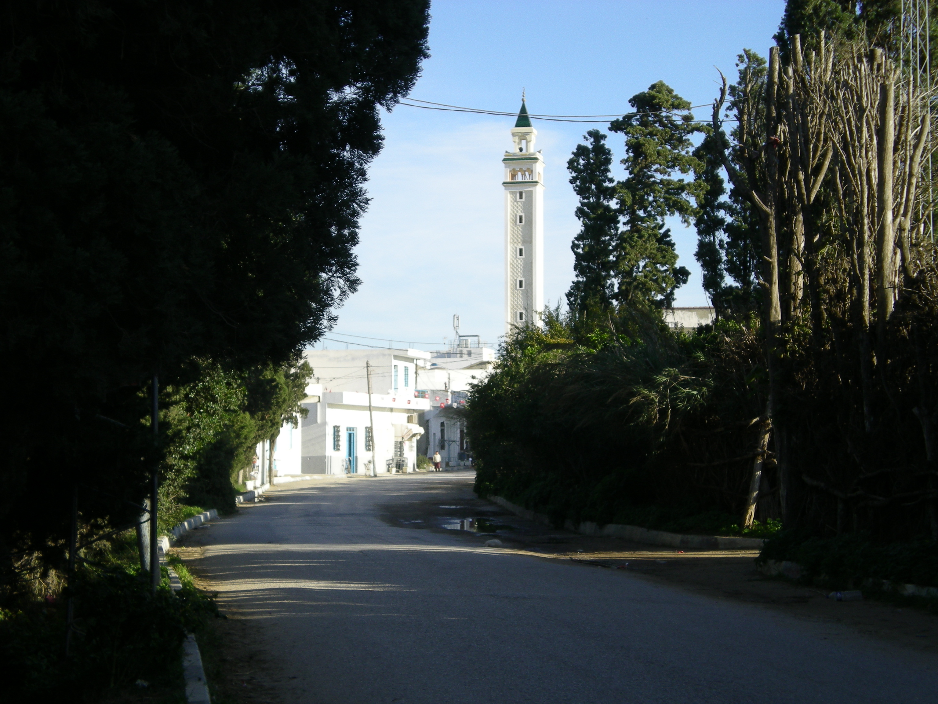 Entrée du village Sounine, Tunisie